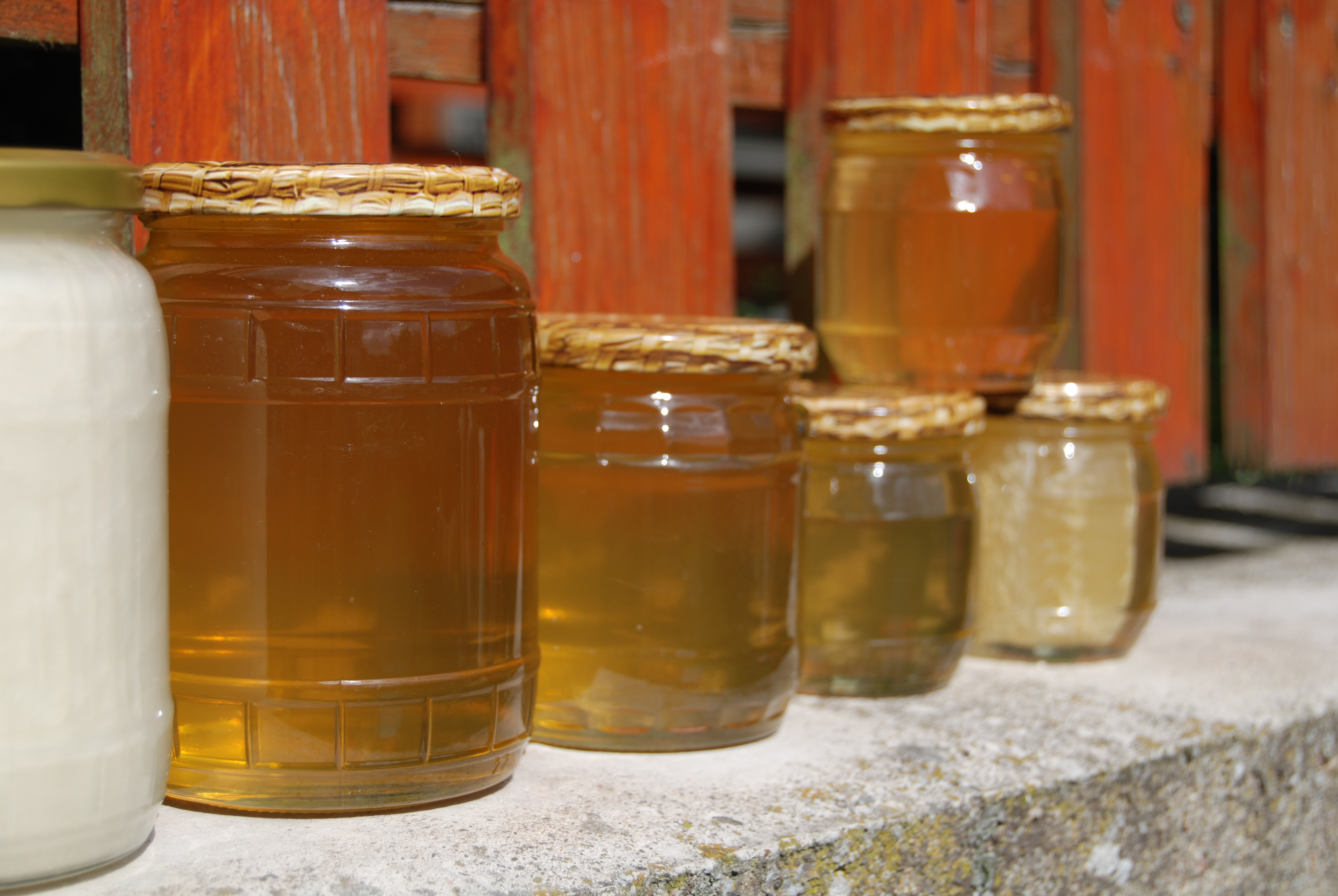 V sortimentu mají akátový, květový, pastový či plástečkový med. Vše od jejich vlastních včelek.